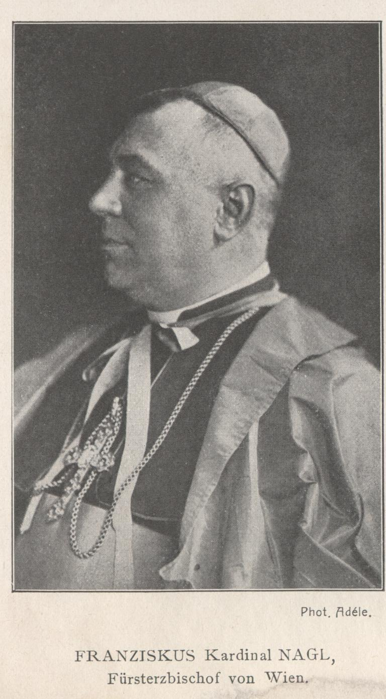 Photo